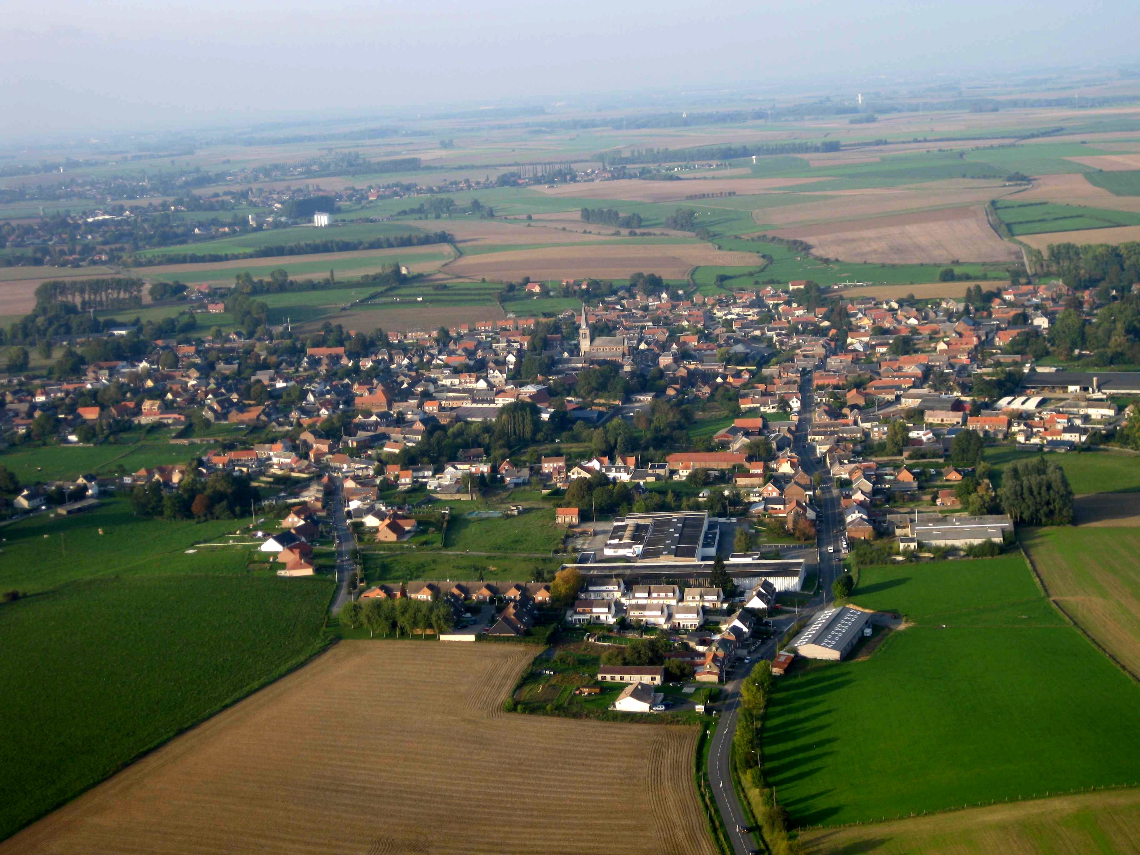 Quievy vu du ciel